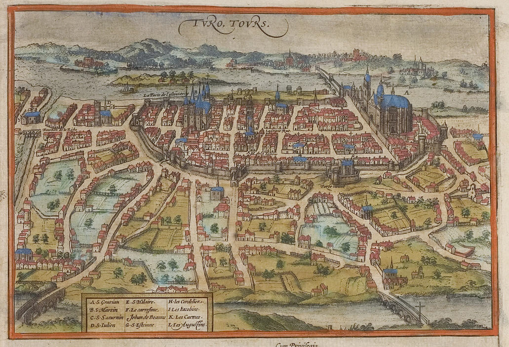 Tours. Les deux entités réunis au cours du XIV° siècle : à l'ouest Chateauneuf autour de la basilique Saint-Martin, à l'est l'ancienne cité autour du château, qui contrôle le pont d'Eudes, et la cathédrale Saint-Gatien